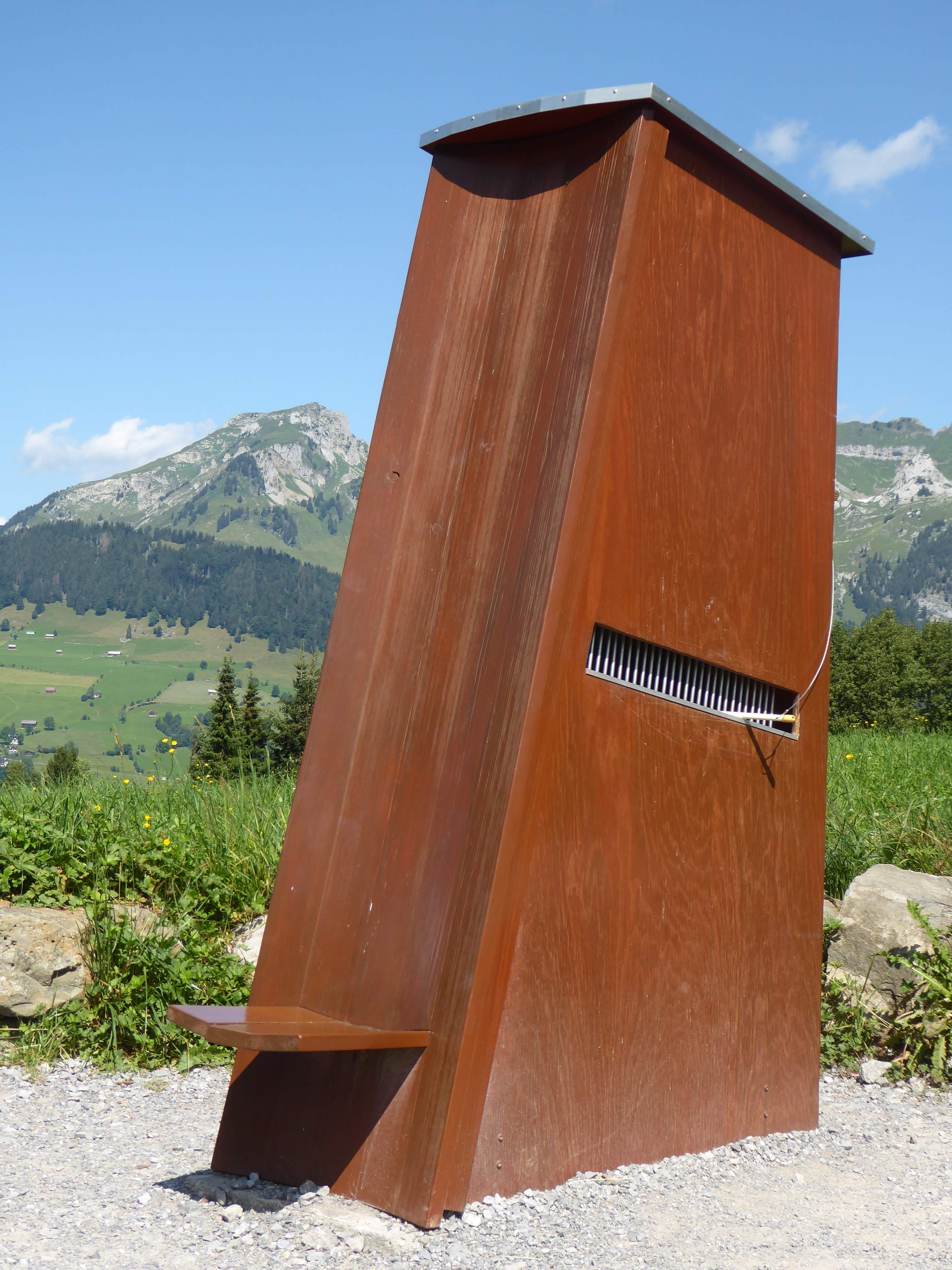 Klangstation «Chäserruggguck» von Stefan Philippi beim Schwendisee